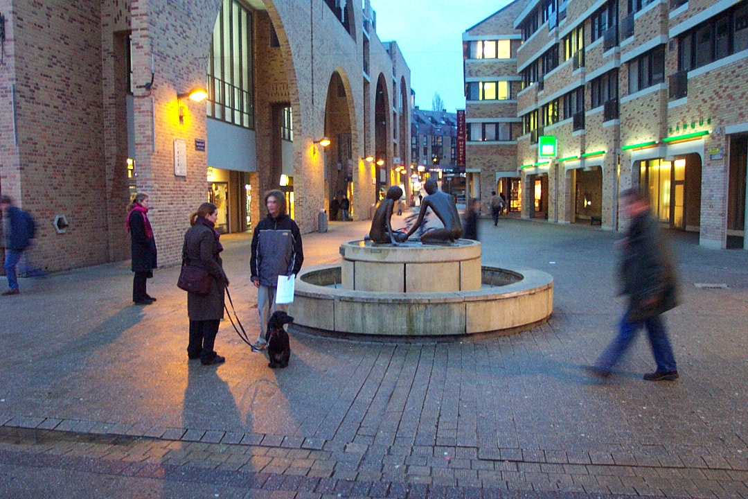 Place de l'Université, centre de Louvain-la-Neuve (Belgique). Au centre, la fontaine "Léon et Valérie".